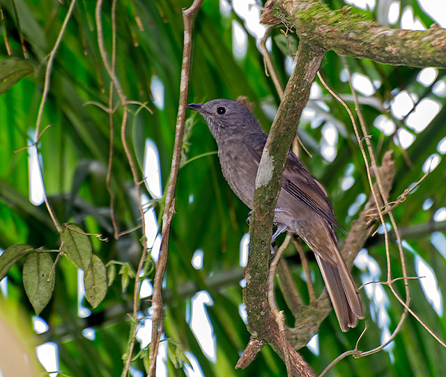 Intervales - Ribeirão Grande-SP - Brasil